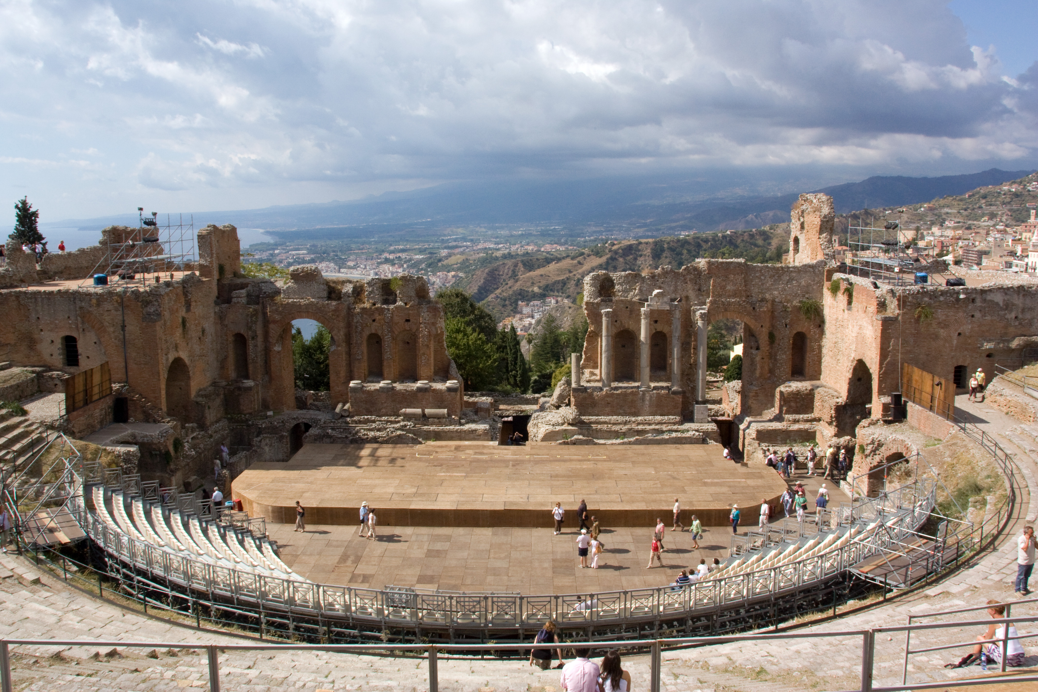 Théâtre greco-romain de Taormina